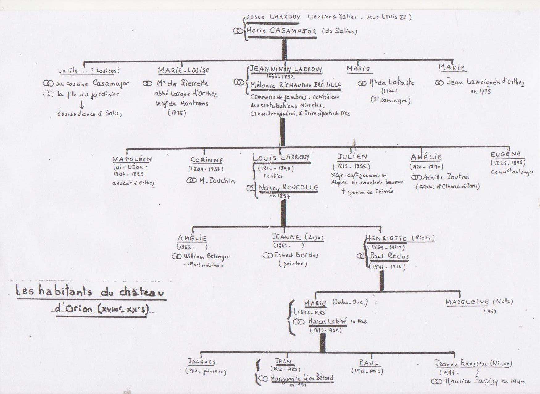 Bewohner des Château d´Orion (18. bis 20. Jhd)